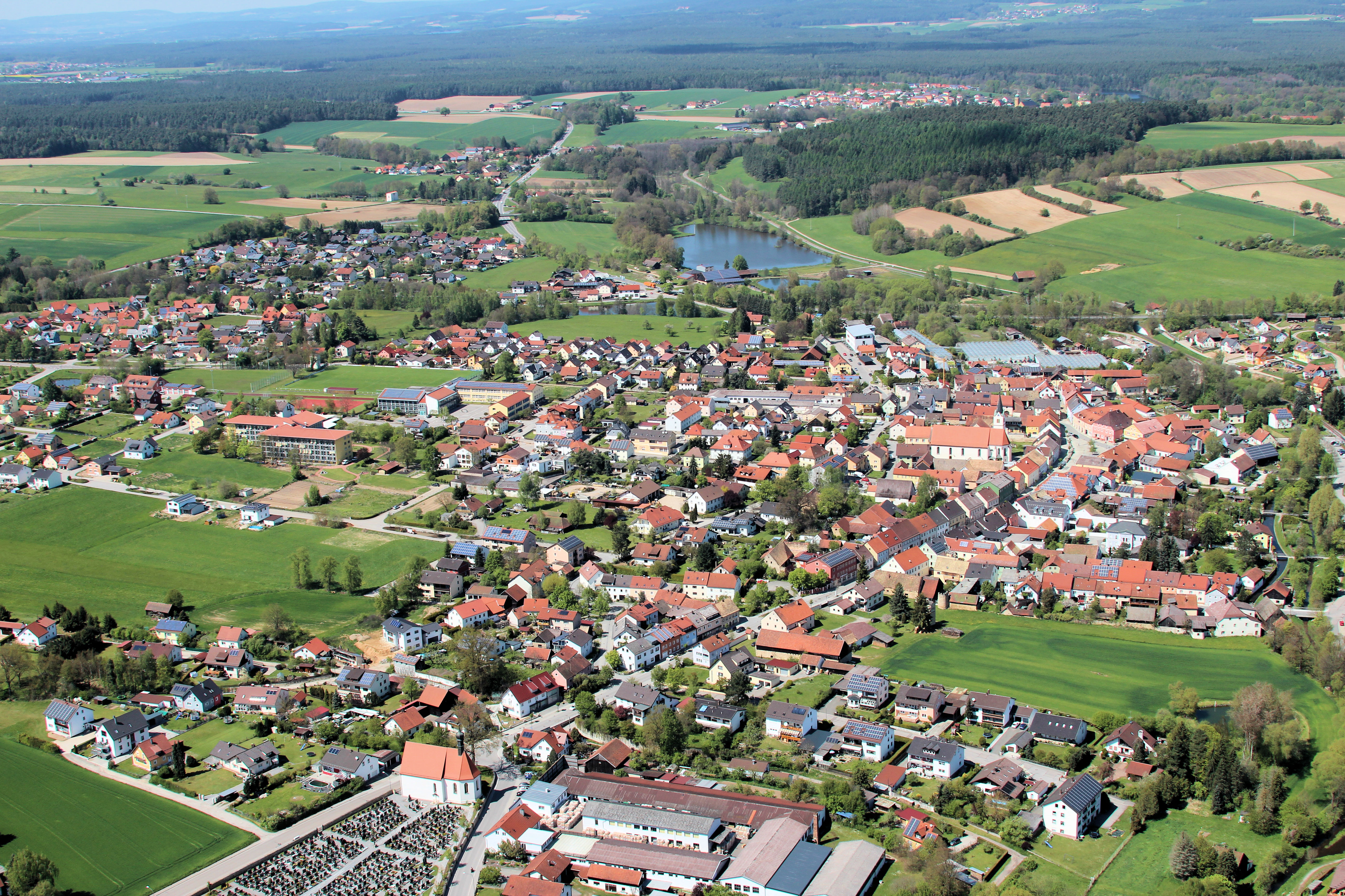 Bruck; Landkreis Schwandorf, Oberpfalz, Bayern